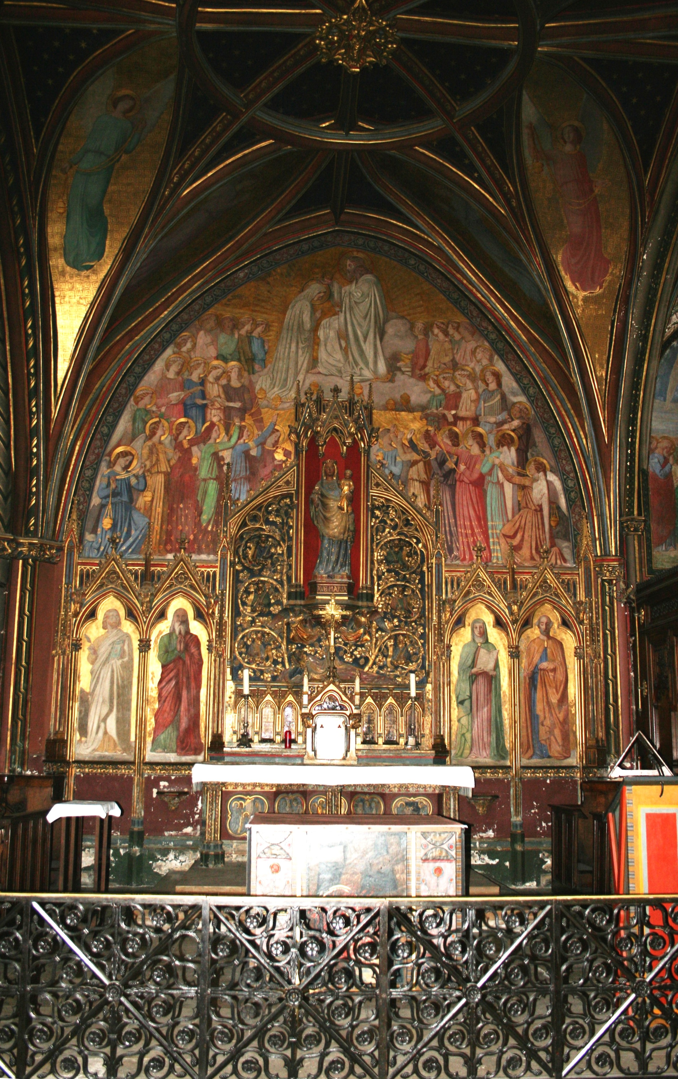 Le Couronnement de la Vierge, fresque d'Amaury Duval (1808-1885), élève de Jean-Dominique Ingres, en l'église Saint-Germain-l'Auxerrois, Paris